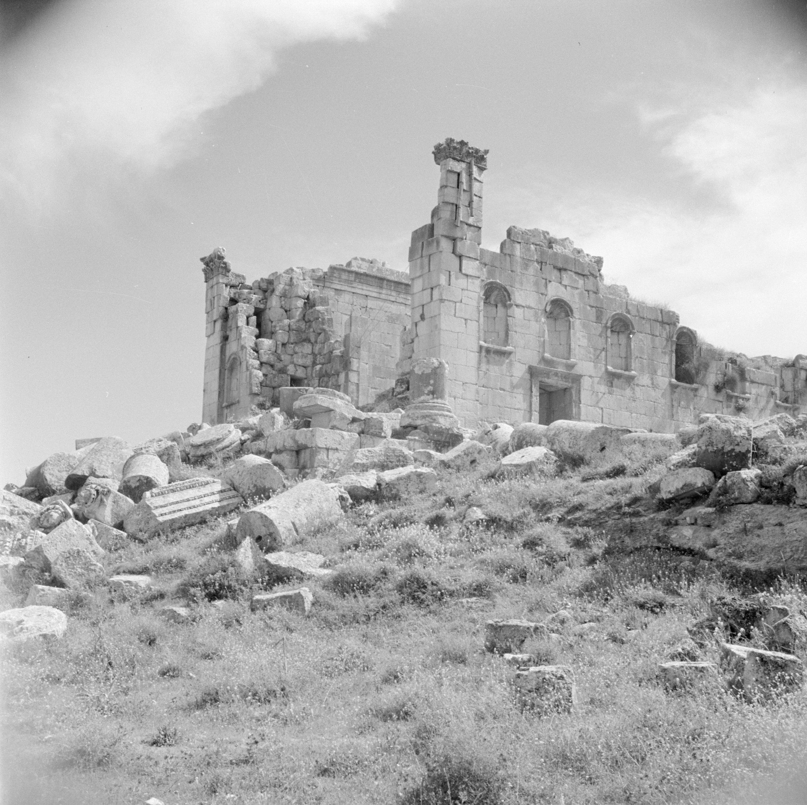 Collectie / Archief : Fotocollectie Van de Poll Reportage / Serie : Midden-Oosten 1950-1955: Jordanië Beschrijving : Zeus tempel in Jerash Datum : 1950 Locatie : Jerash, Jordanië Trefwoorden : Romeinse oudheden, ruines, theaters Fotograaf : Poll, Willem van de Auteursrechthebbende : Nationaal Archief Materiaalsoort : Negatief (zwart/wit) Nummer archiefinventaris : bekijk toegang 2.24.14.02 Bestanddeelnummer : 255-5699